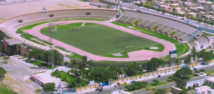 Panorámica del estadio "Elias Aguirre" de la ciudad de Chiclayo